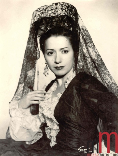 Mariemma en Danza Estilizada